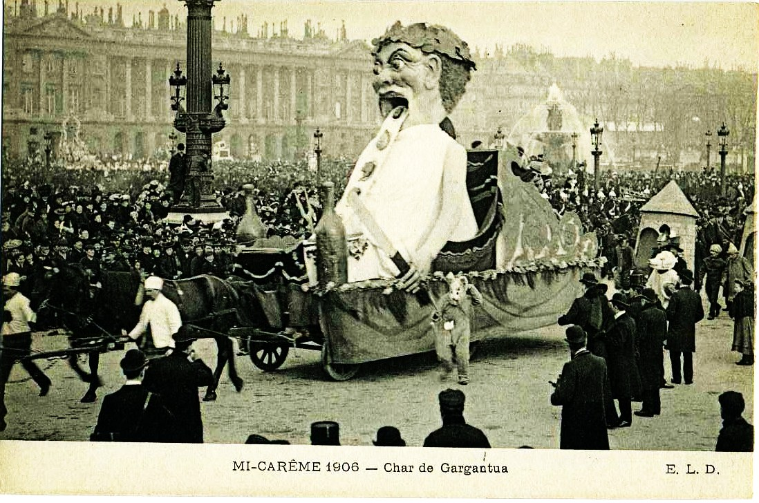 Le Char de Gargantua à la Mi-Carême à Paris 1906.